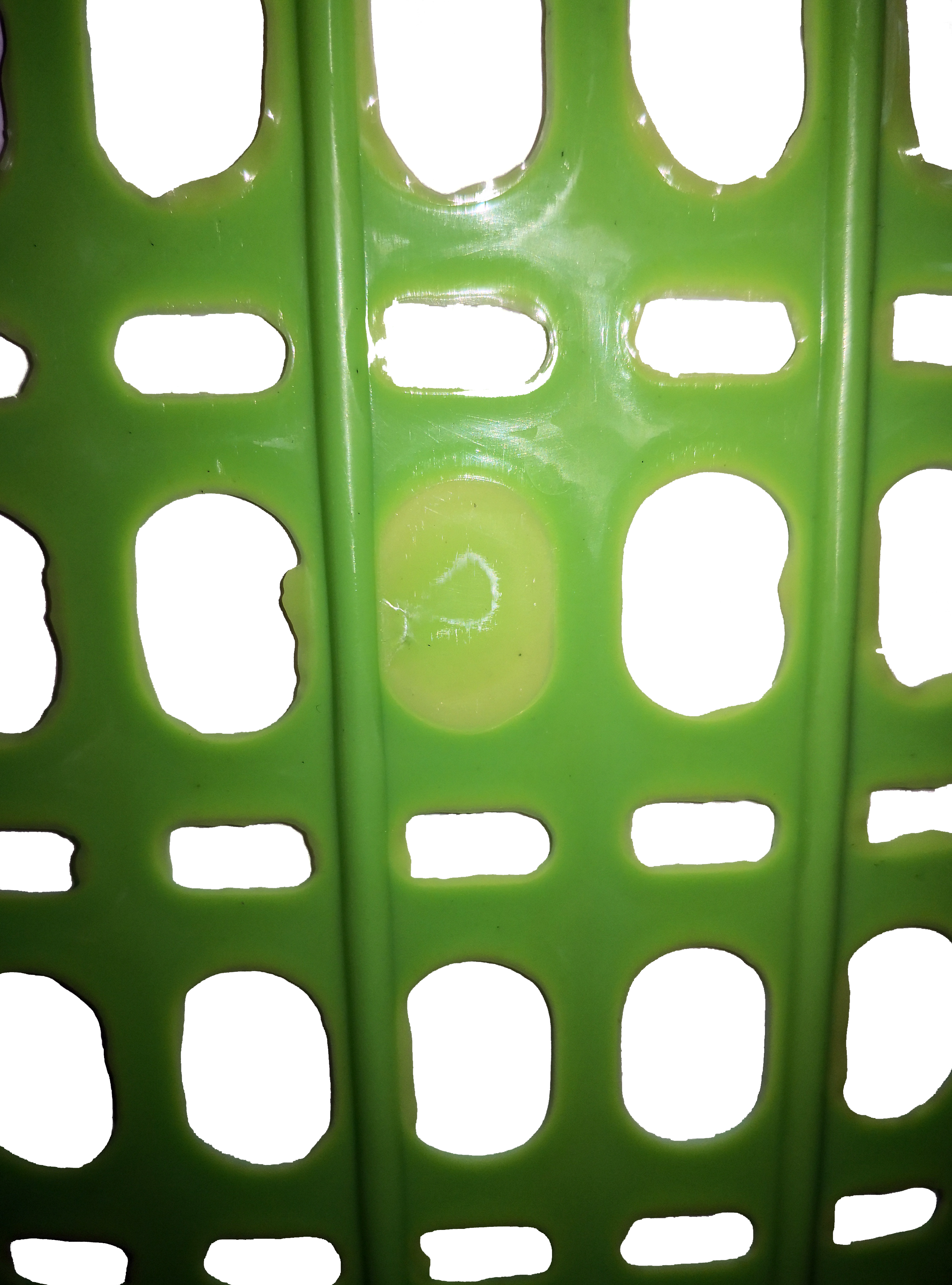 Kecacatan "flashes" di atas produk bakul plastik dimana lebihan plastik diinjection mouldingkan tanpa apa apa pemrosesan